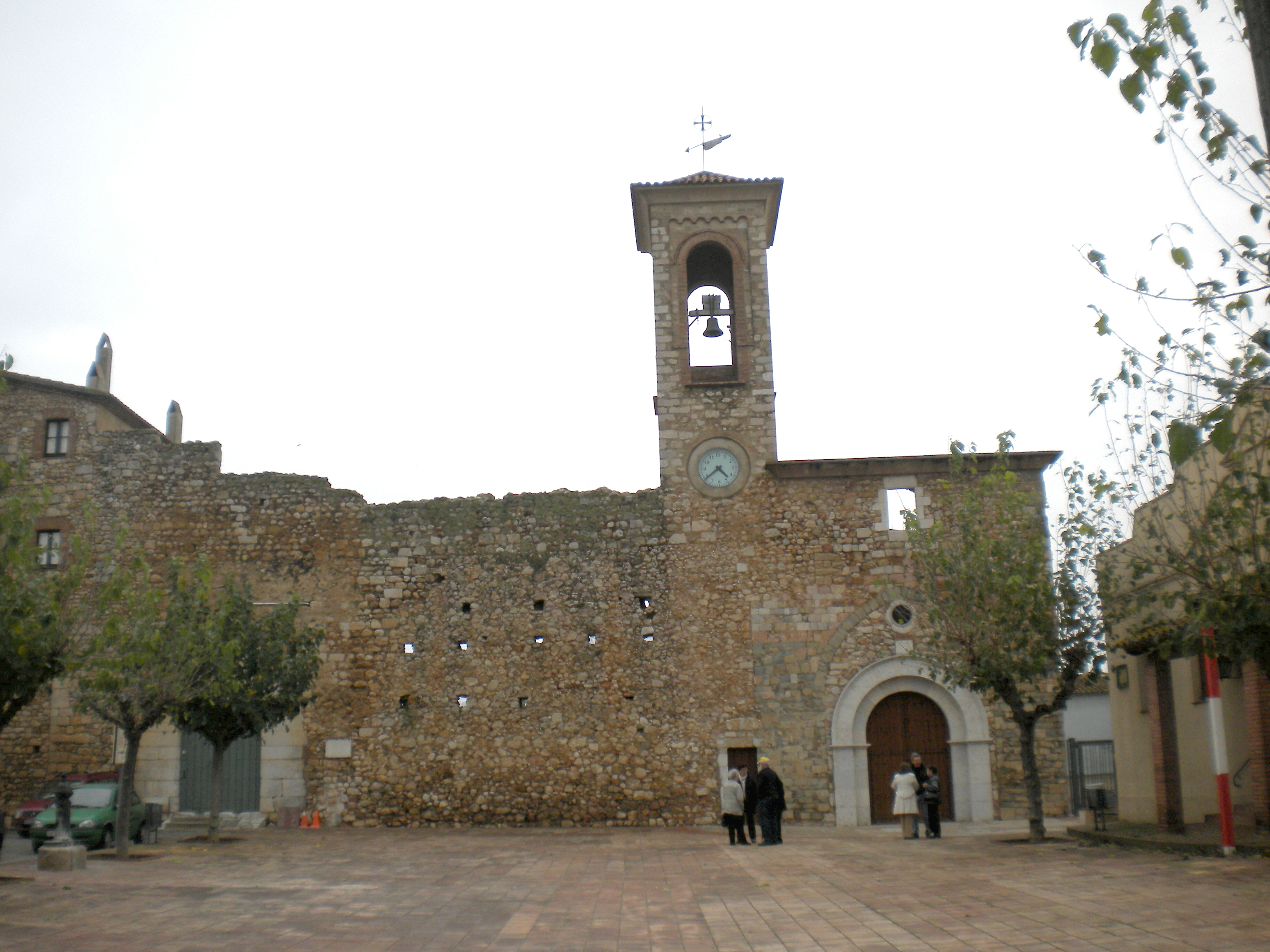 Façana del Castell d'Albons i l'església adjacent de Sant Cugat.